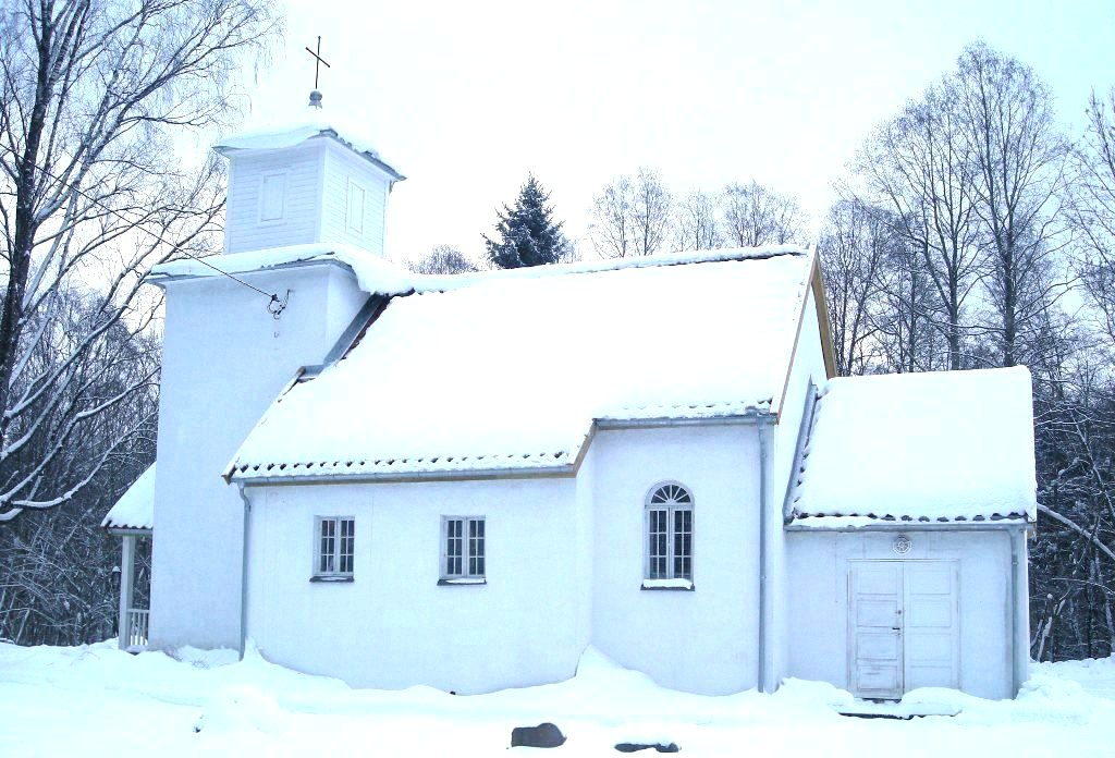 Slemmestad kapell, på kirkegården sør for Slemmestad